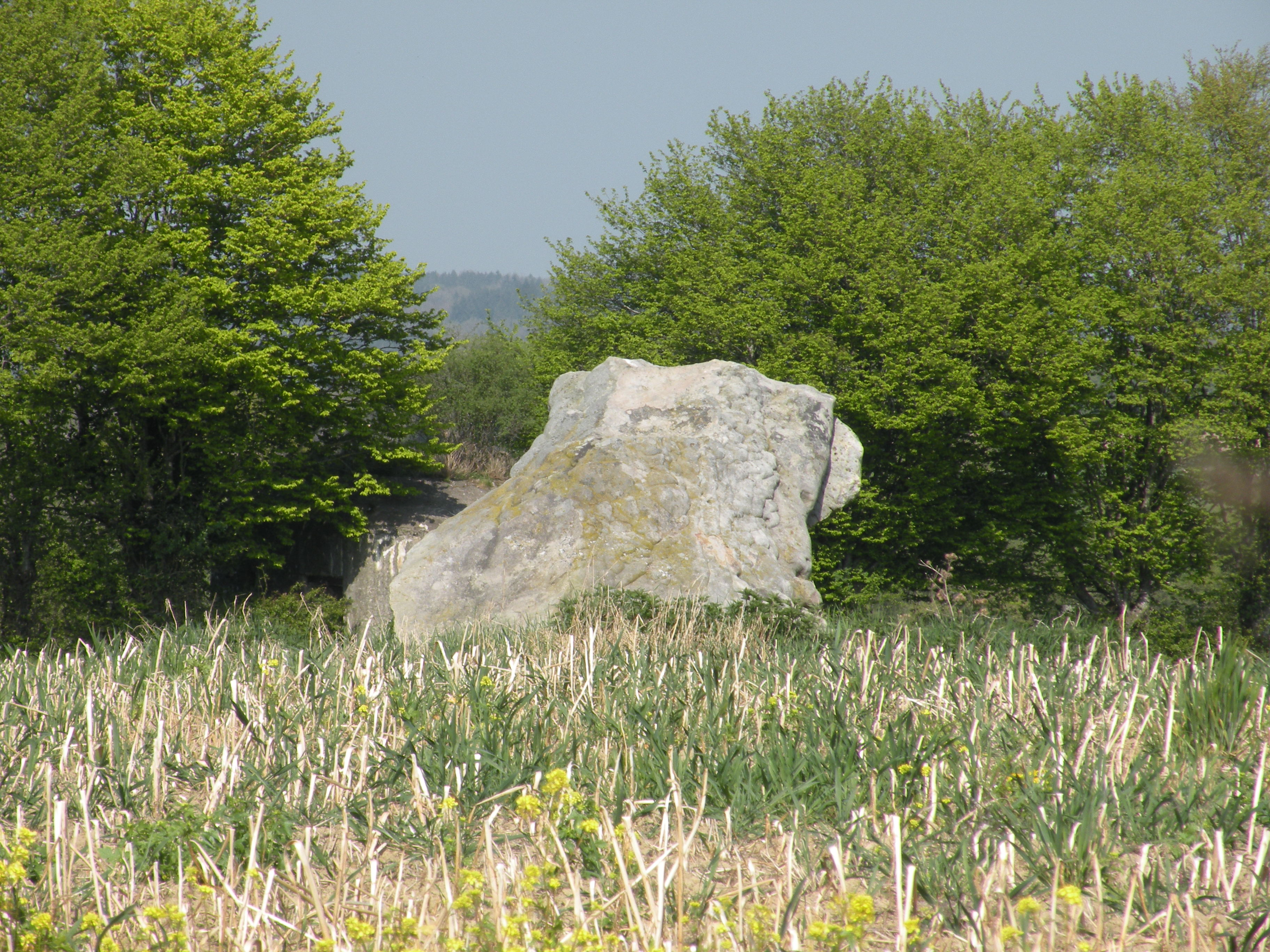 Pierres Martine de Solre-le-Château